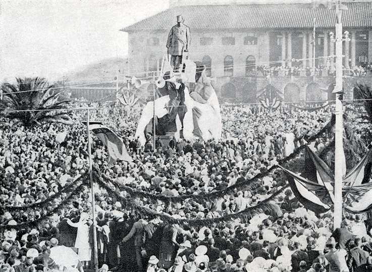 Onthulling van die Krugerstandbeeld voor Pretoria-stasie